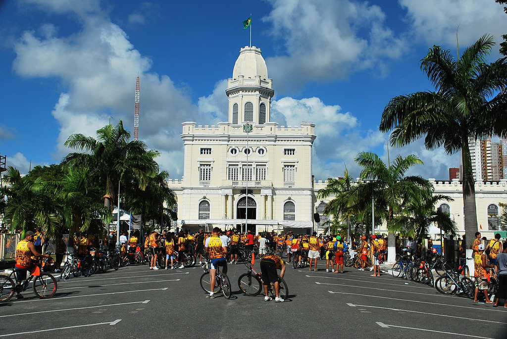 Esta foto foi tira durante um evento ciclistíco que acontece todo ano em frente a este quartel no estado de Pernambuco-Brasil.